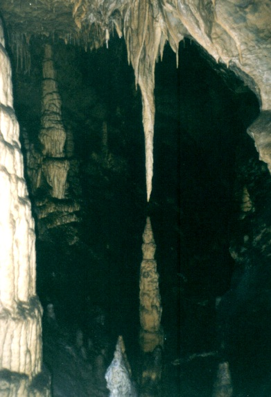 Stalaktyt i stalagmit w Jaskini Bielskiej na Słowacji